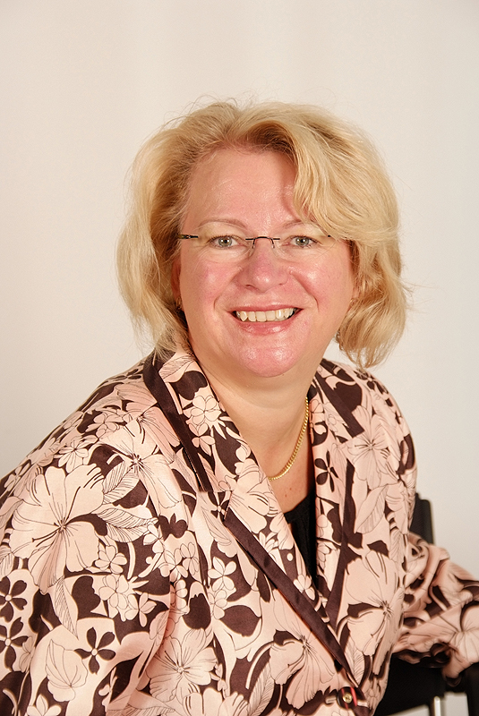 Heidemarie Mundlos, Landtagsabgeordnete Niedersachsen, 16. Wahlperiode (Fotoprojekt Landtagsabgeordnete Niedersachsen am 24. und 25. November 2009)